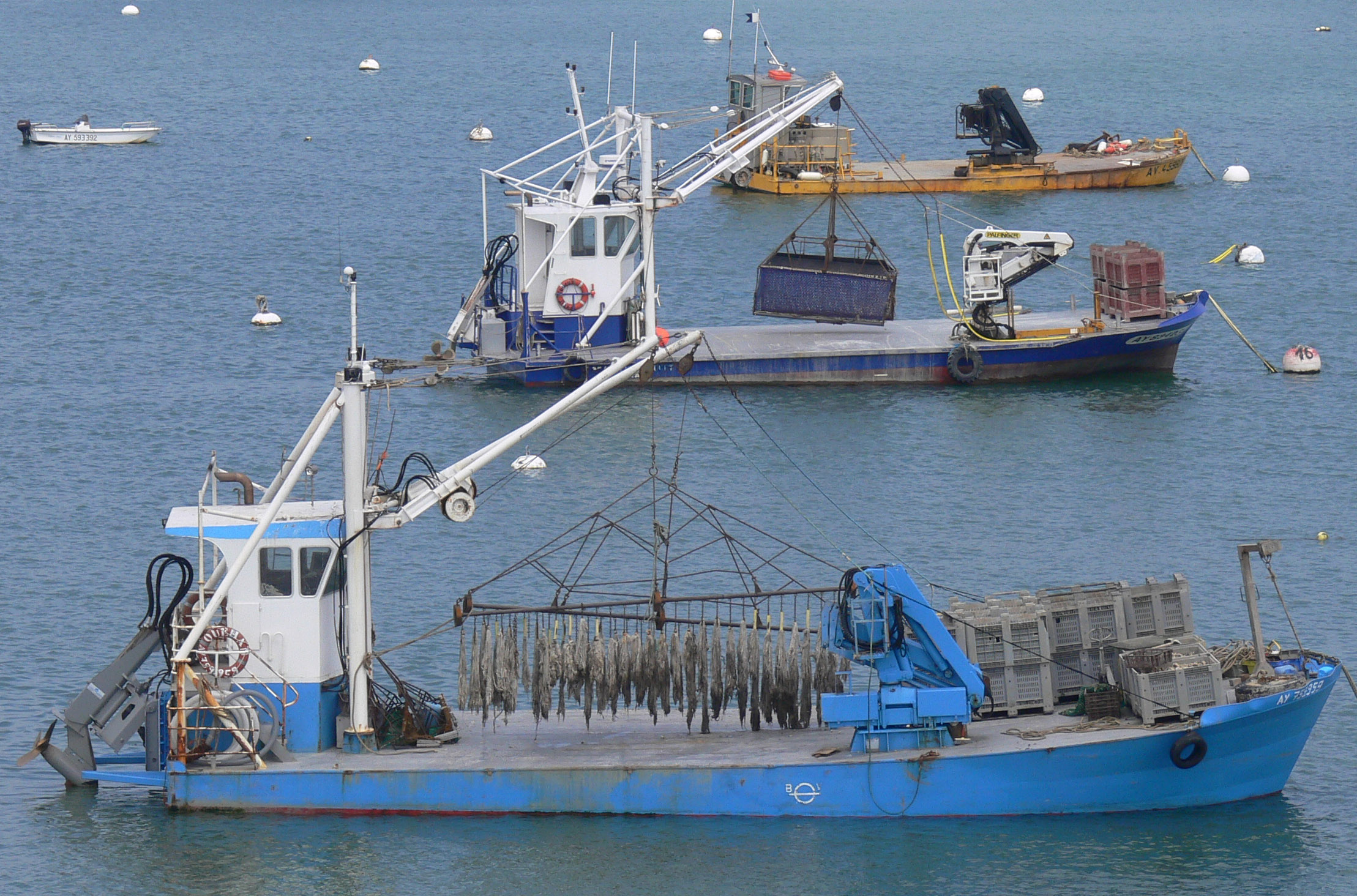 Les moules sont cultivées sur bouchot (alignements de pieux)ou suspendues à des structures métalliques en eau plus profonde. Des bateaux à fonds plats en permettent la récolte. Lieu : Près de la Trinité, Morbihan, Bretagne-sud, Ouest de la France, Europe